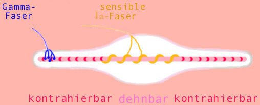 Muskelspindel; selbst erstellt; gemeinfrei